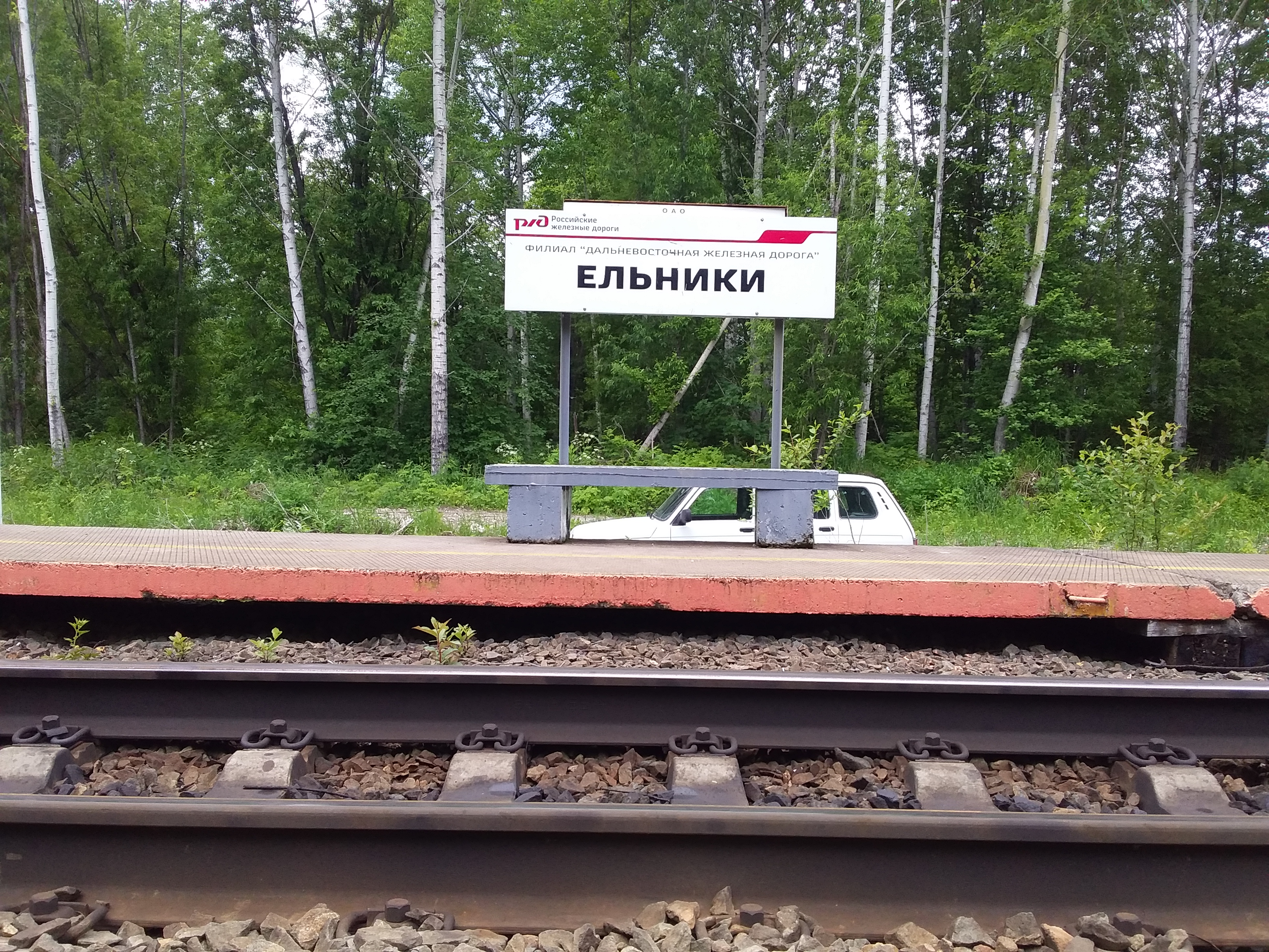 Сахалинский регион ДВЖД, платформа Ельники